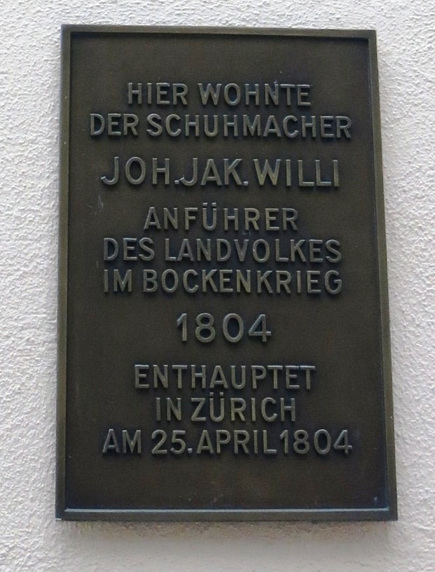 Gedenktafel für Johann Jakob Willi, Horgen ZH, Schweiz